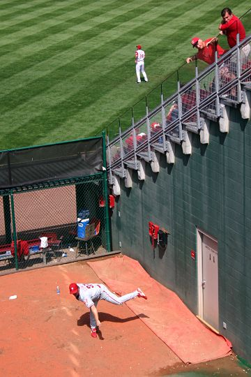 Baseball, Bullpen, Cincinnati, 2004, by Rick Dikeman 03:33, 16 September 2004 . . Rdikeman . . 360×540 (46,369 bytes)